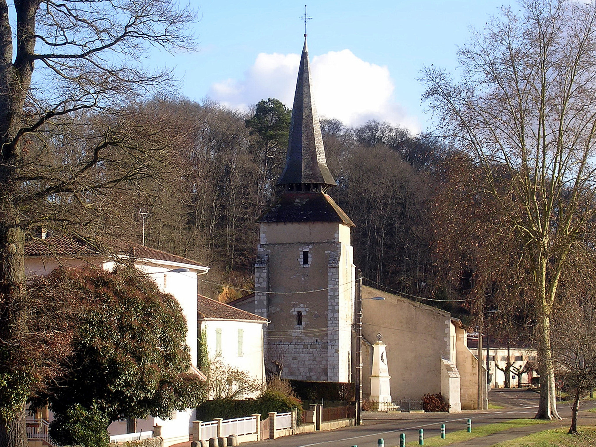 Bourg d'Eyres-Moncube, Landes (France)